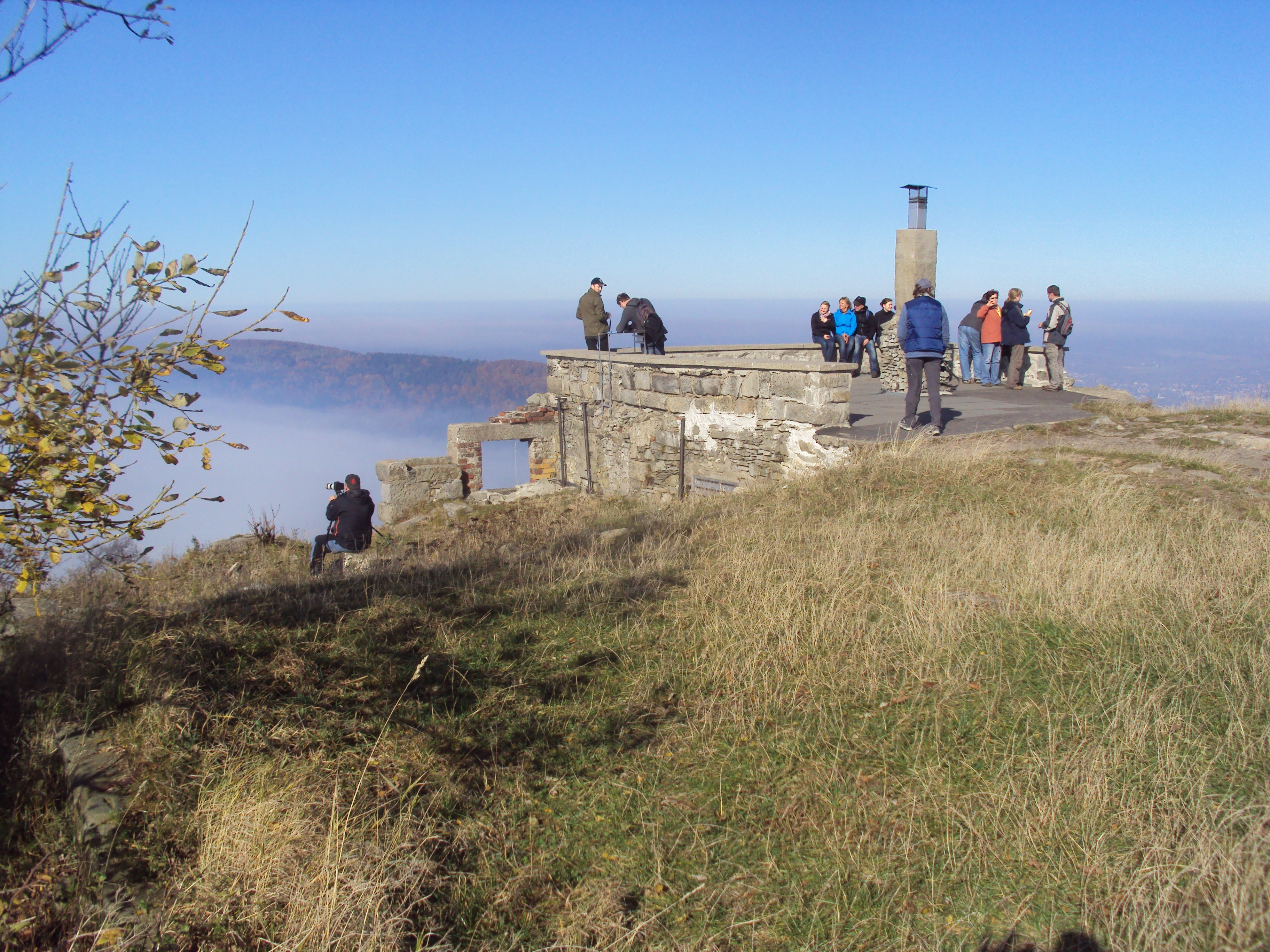 Na vrcholu Luže